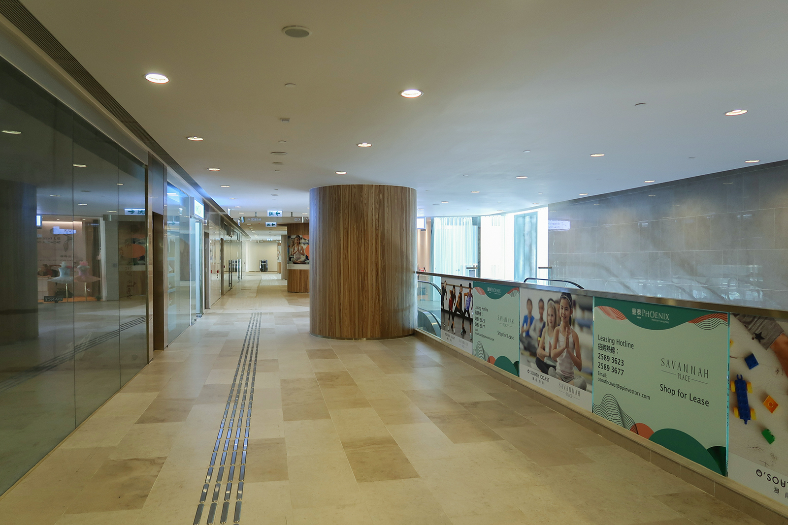 Savannah Place Level 1